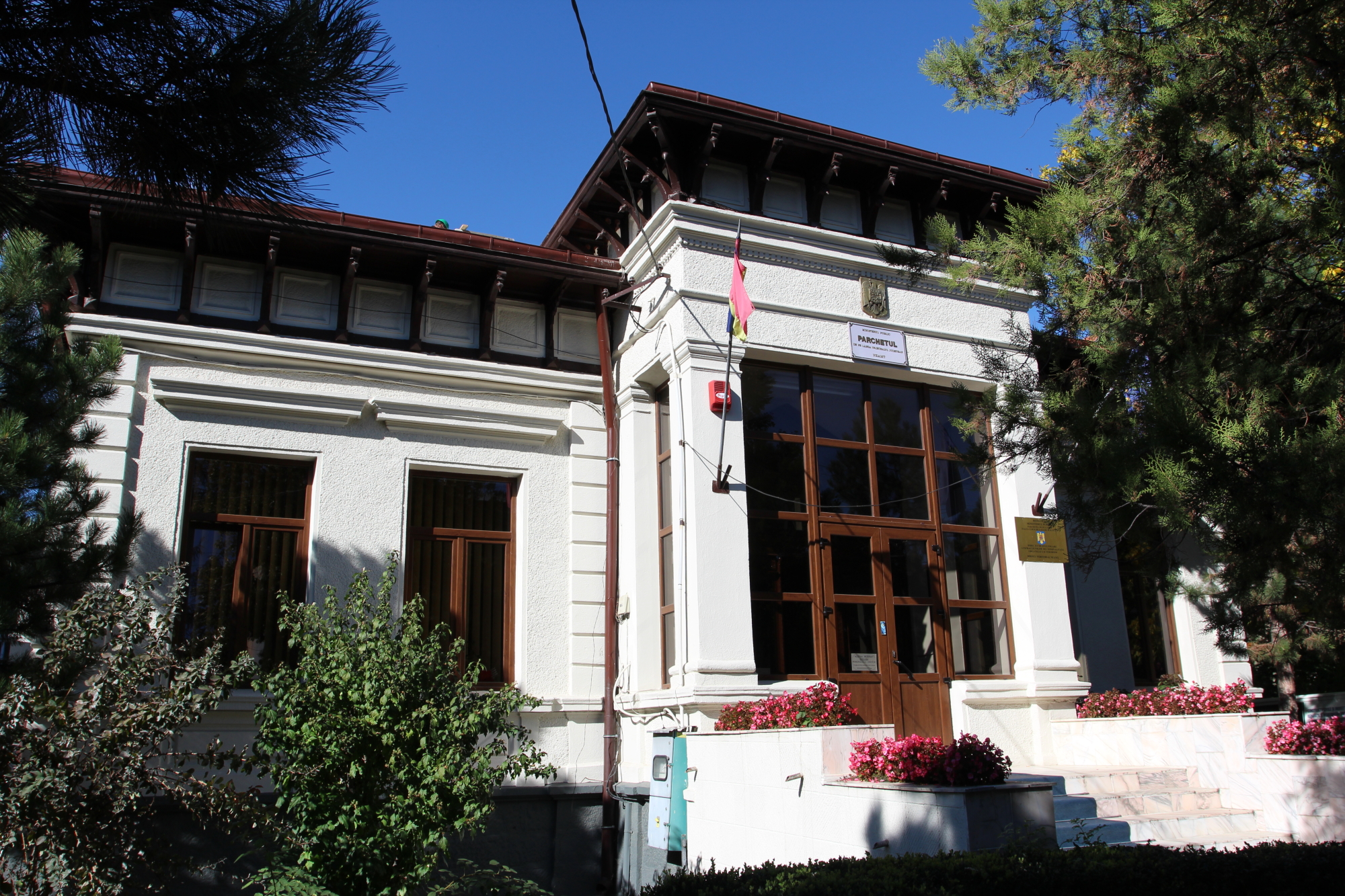 Casa Corbu